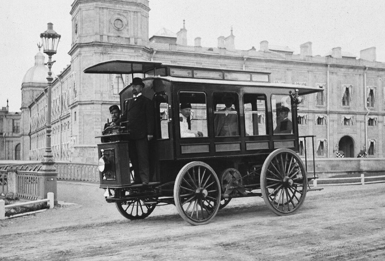 Первый электрический омнибус Ипполита Романова, в г. Гатчине.